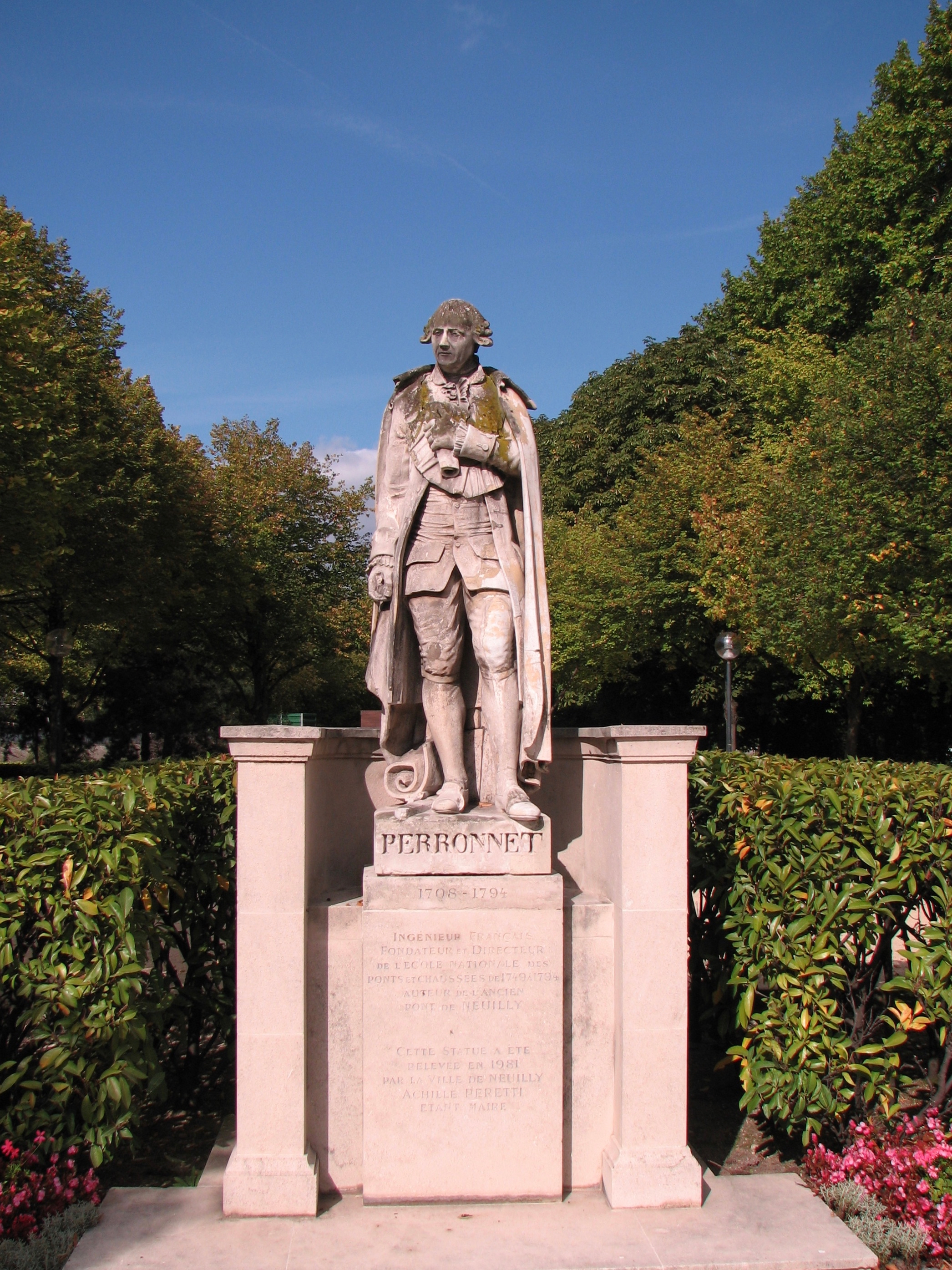 Statue de Jean-Rodolphe Perronet (1708-1794) (écrit ici avec 2 n) sur le square de la pointe nord-est de l'île de Puteaux (Hauts-de-Seine) Statue of Jean-Rodolphe Perronet, french engineer and bridges builder at the nord-east of Puteaux Island on the Seine River near Paris.